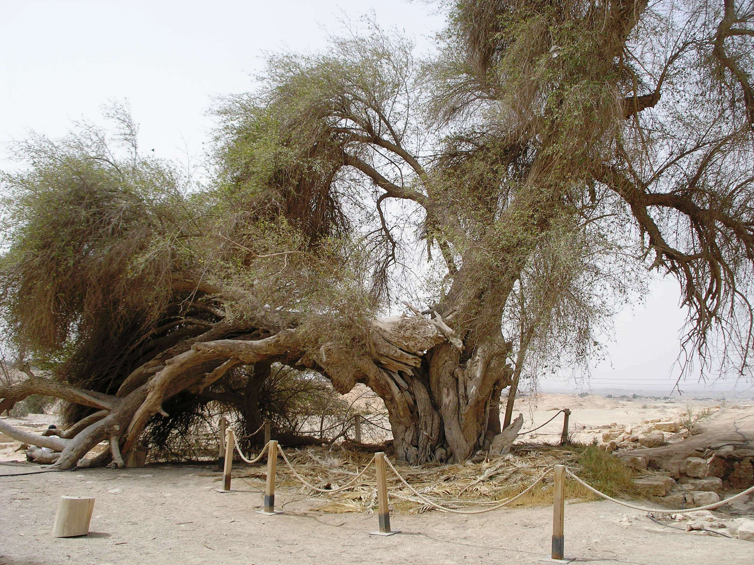 עץ השיזף העתיק בעין חצבה Ancient Sheizaf Tree in Ein Hatzeva Ancient Sheizaf Tree in Ein Hatzeva